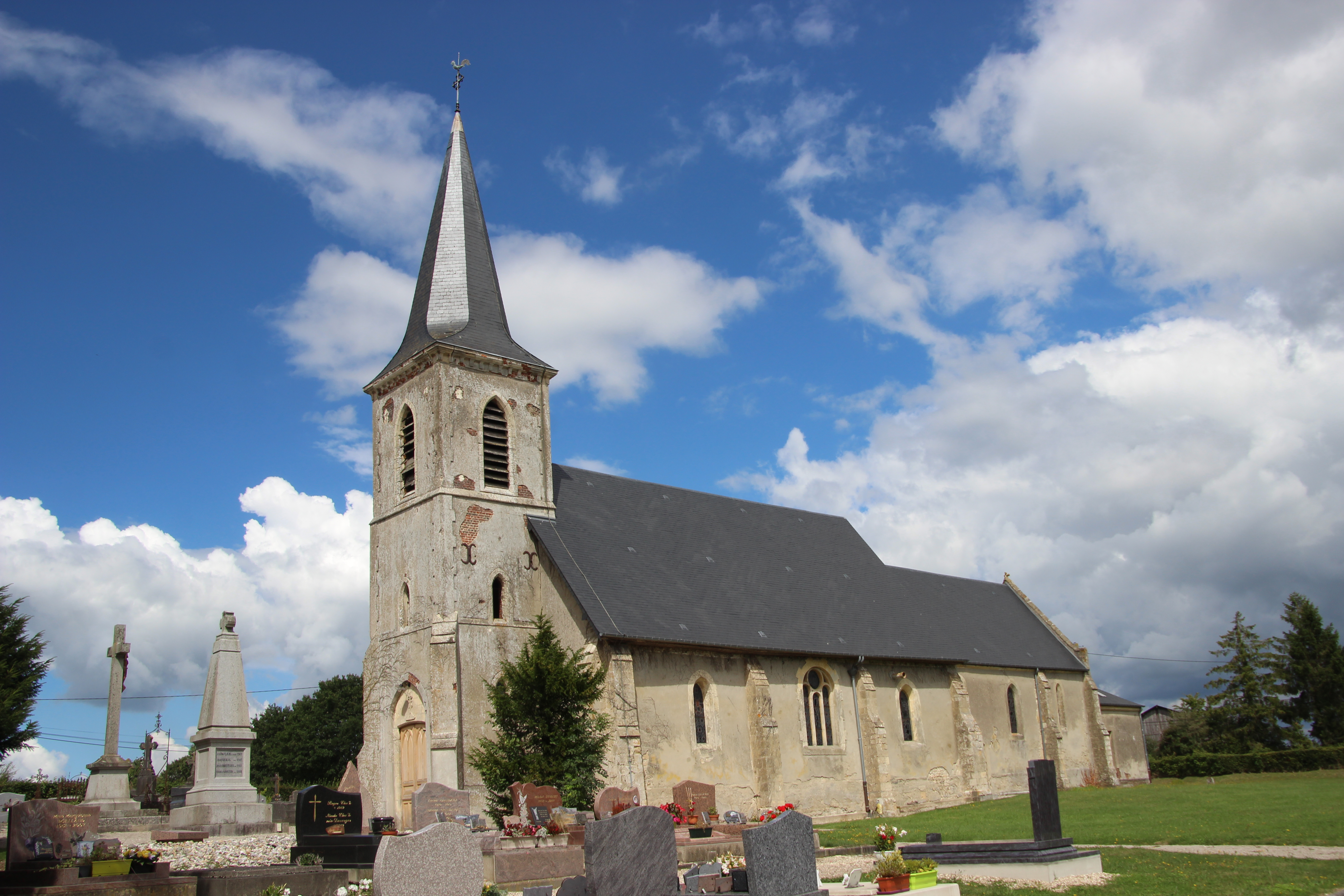 église Saint Pierre des Ifs